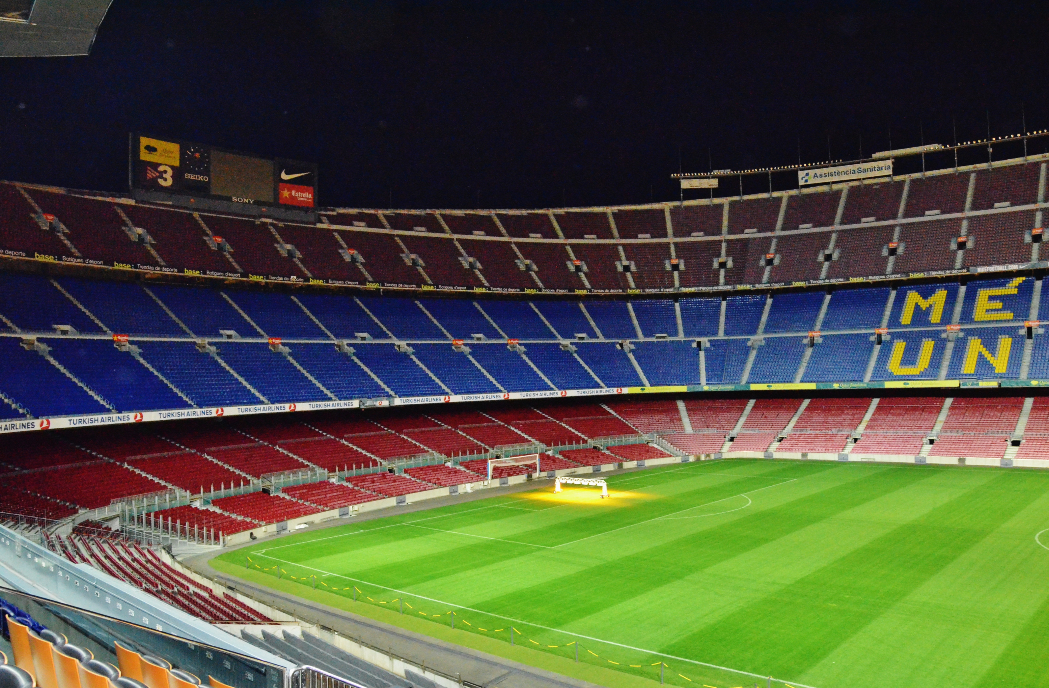 Camp Nou (Barcelona)